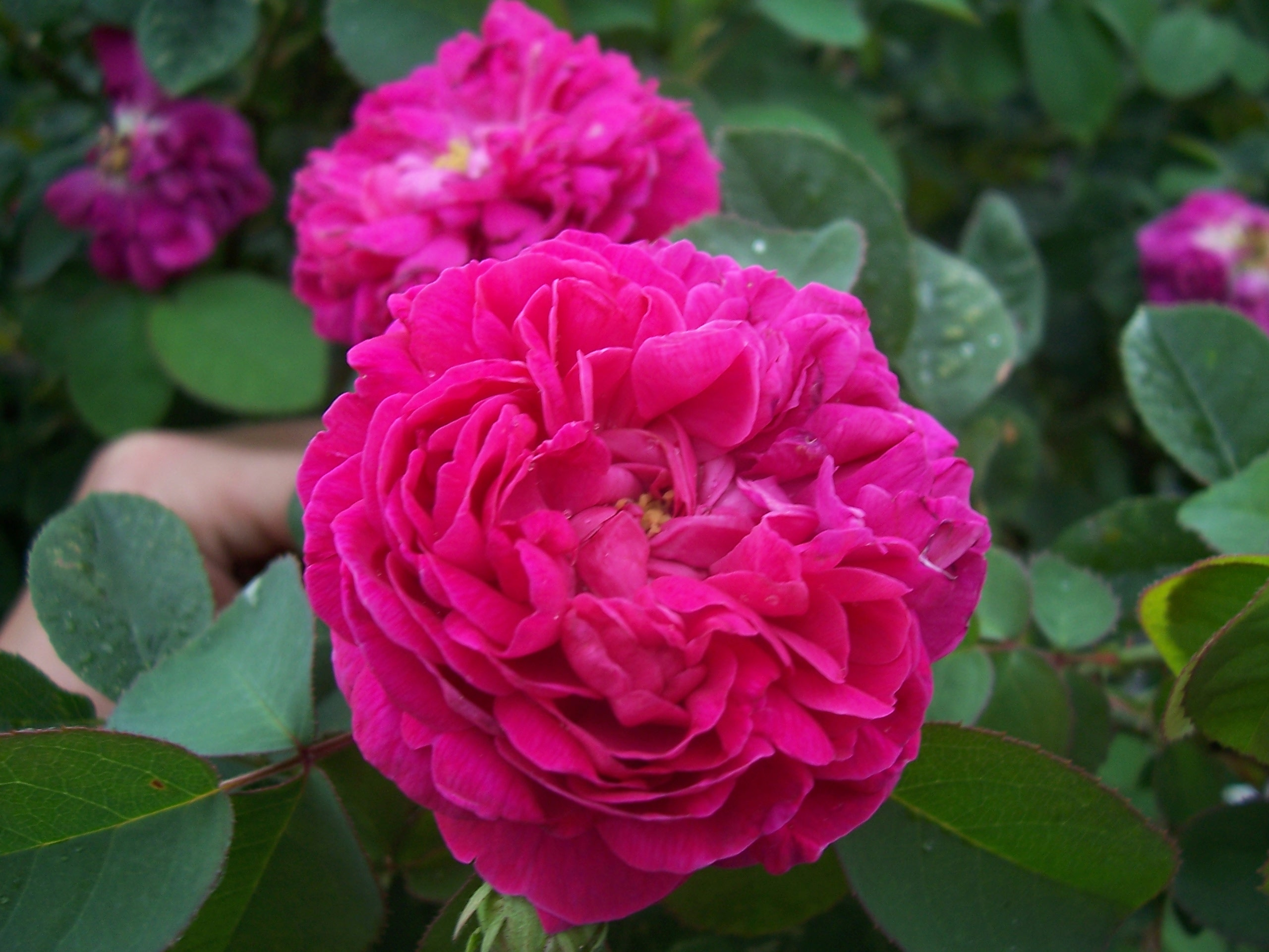 Rosa 'Rose de Rescht', syn. 'Rose de Resht', France 1840